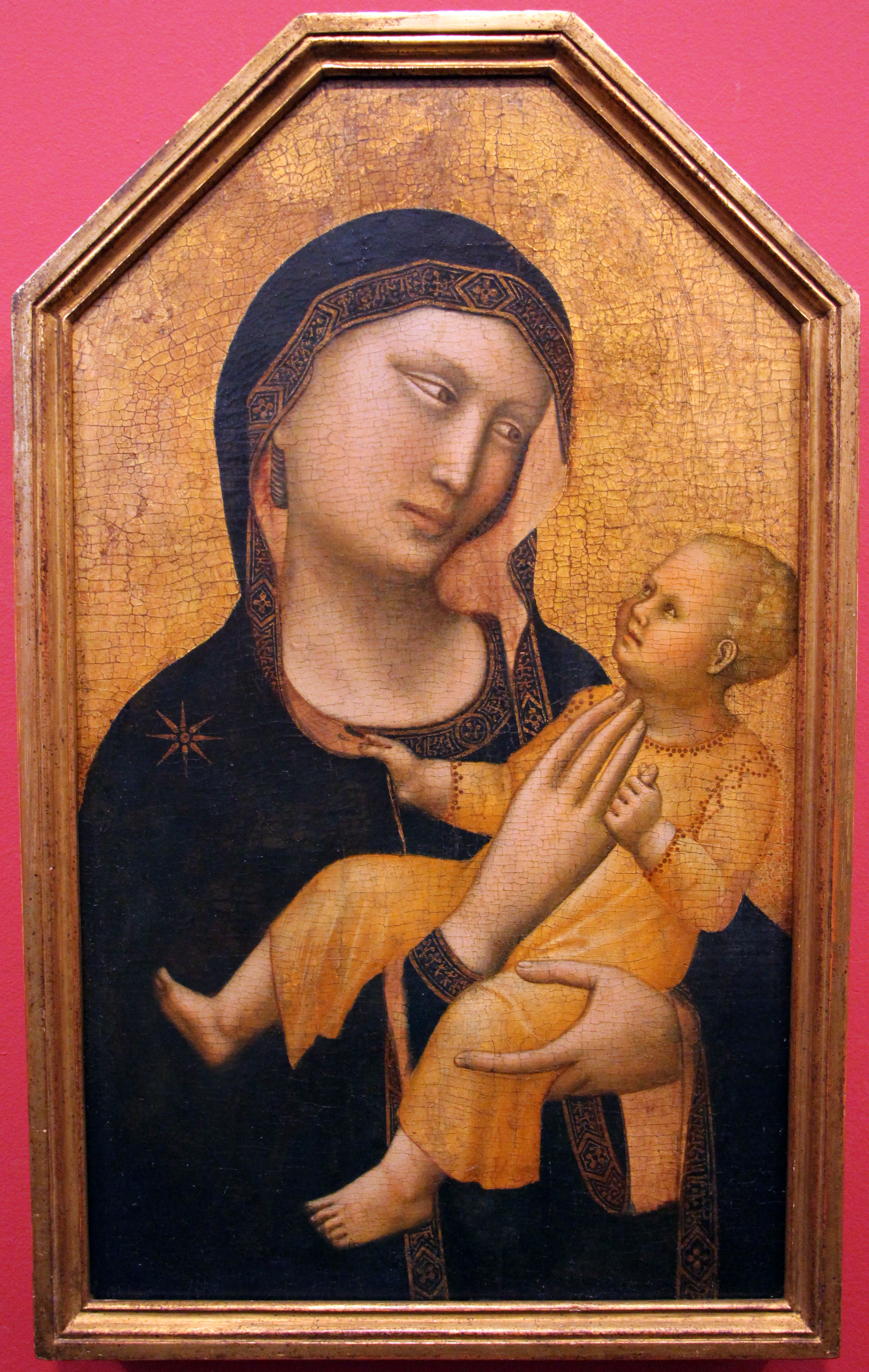 Museu de Arte de São Paulo